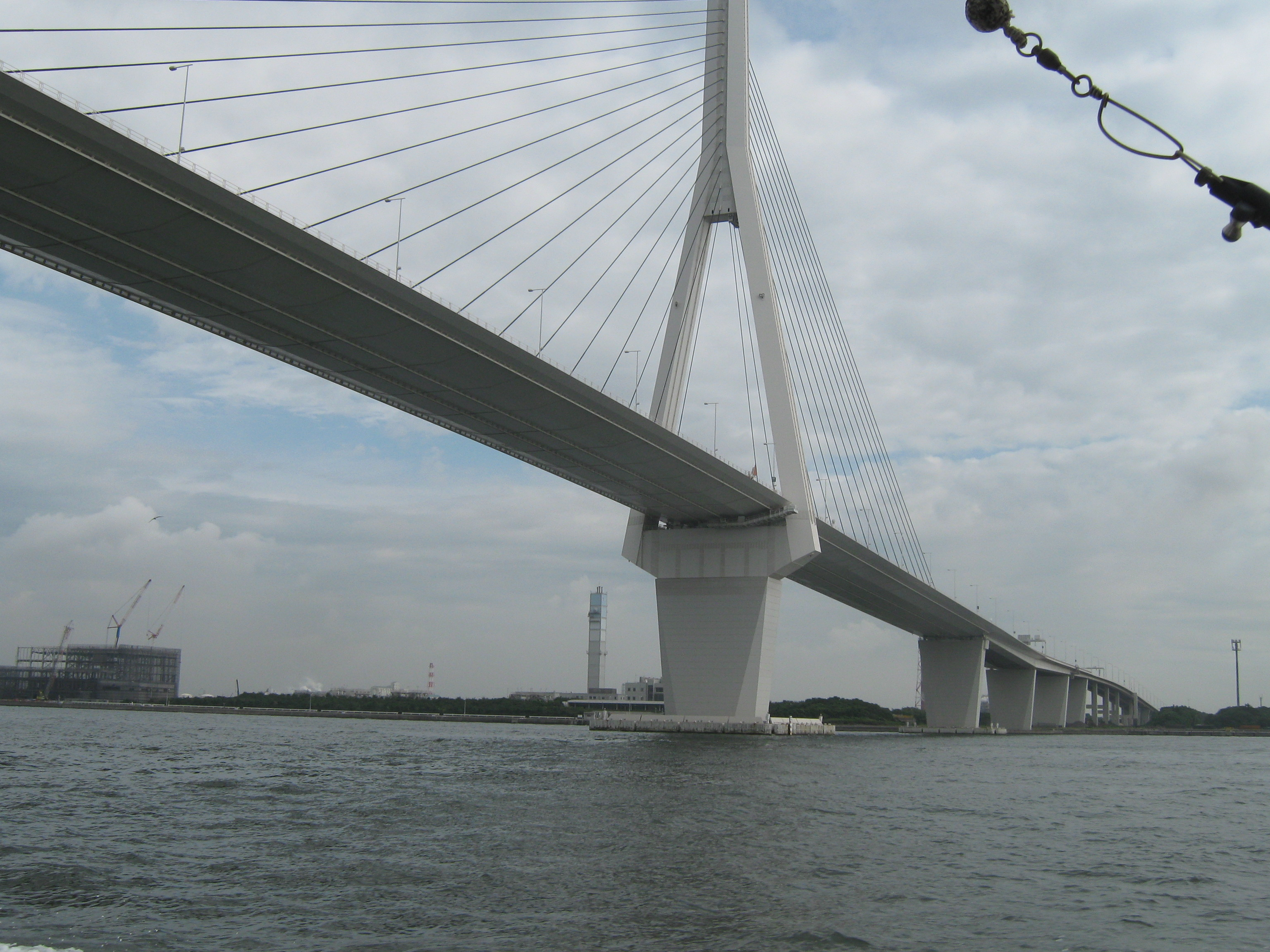 海上から見た鶴見つばさ橋